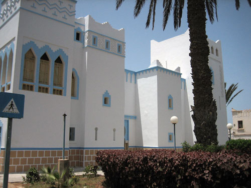 Palais du gouverneur - Sidi Ifni